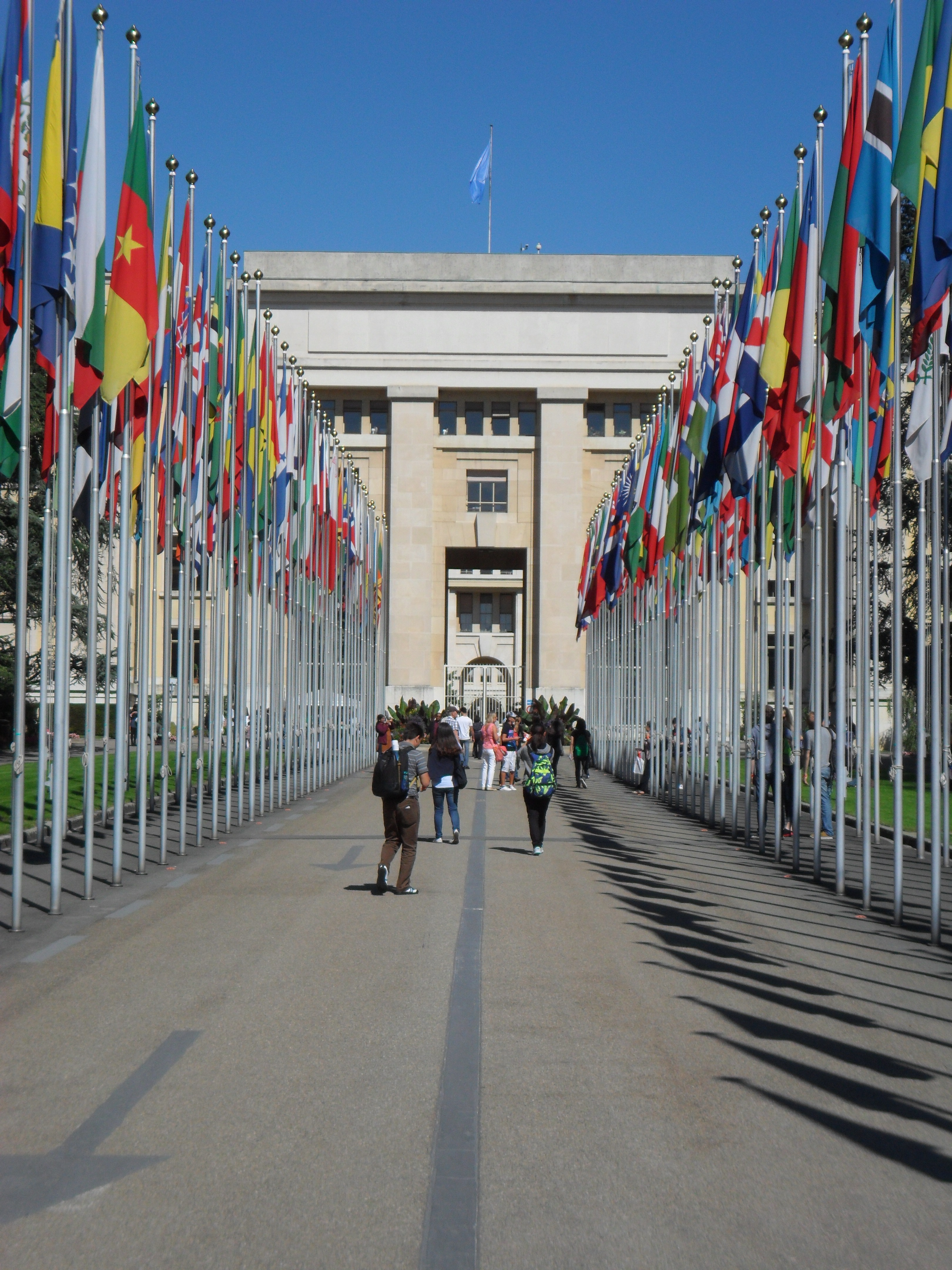 Allée des Nations avec vue sur le bâtiment S du Palais des Nations